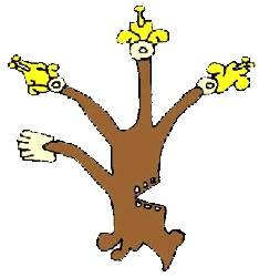 Glifo de Xochicoatlán, Hidalgo